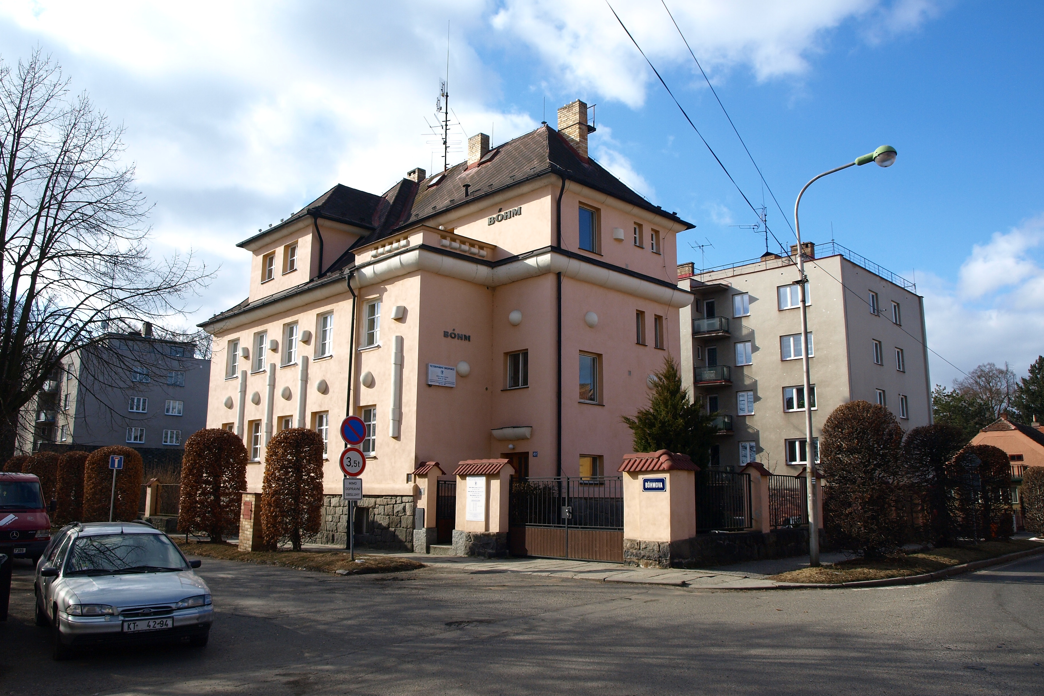 Böhmova vila, Böhmova 451, Blatná